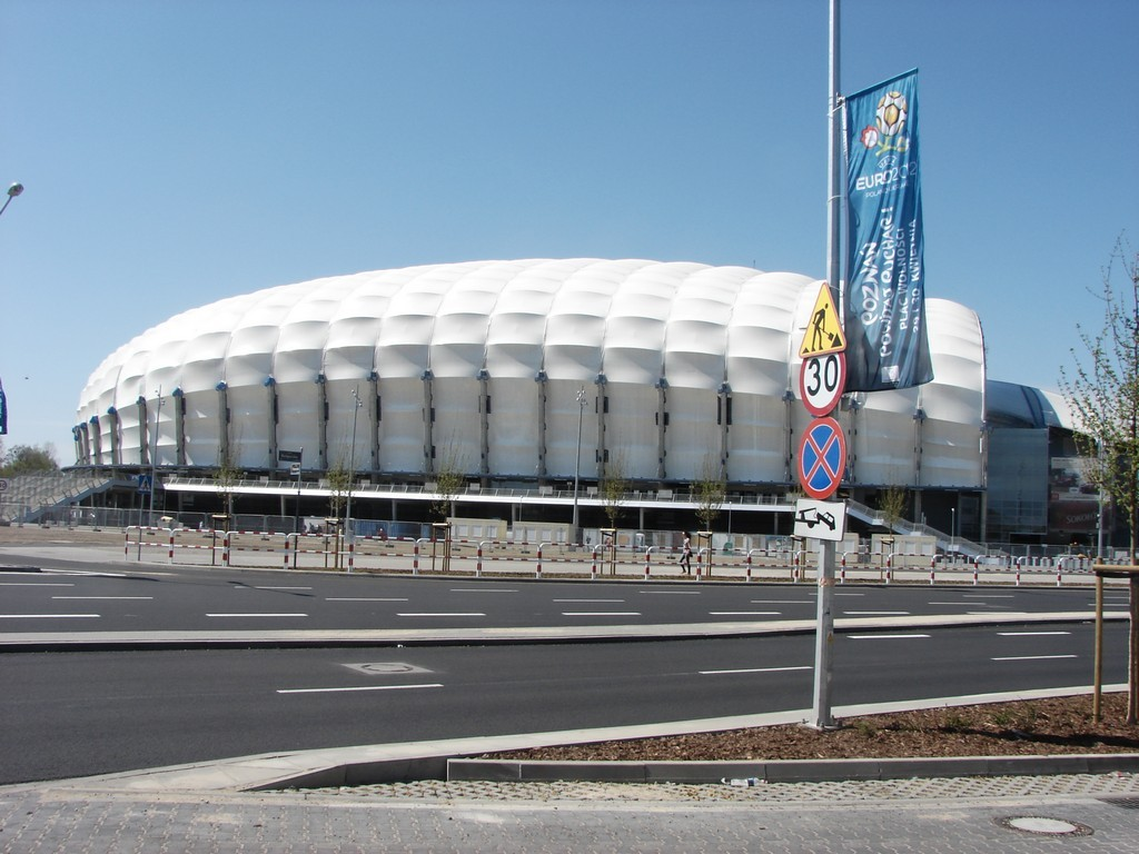 Stadion Miejski w Poznaniu